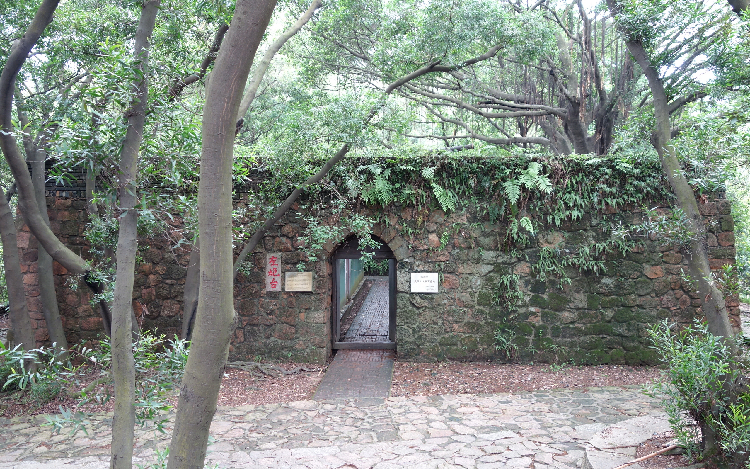 赤湾左炮台